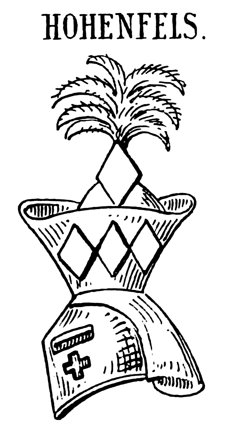 Spitzhut mit hoher Krempe, belegt mit drei Rauten, auf der Spitze ein Hahnenbusch